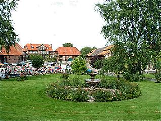 Gut Gross Vahlberg bei Wolfenbüttel, seit 1776 im Besitz der Freiherren von Münchhausen